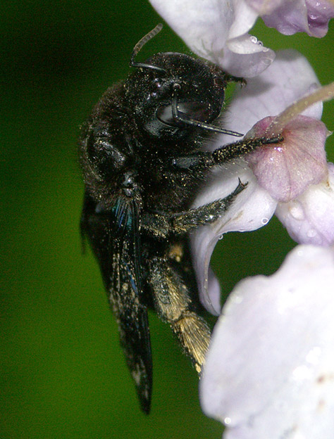 Femelle d'abeille charpentière (Xylocopa valga) sur glycine (Wisteria chinensis), photographiée à Lyon.